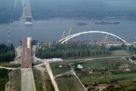 Dunaújváros, hungary, aerialphotography